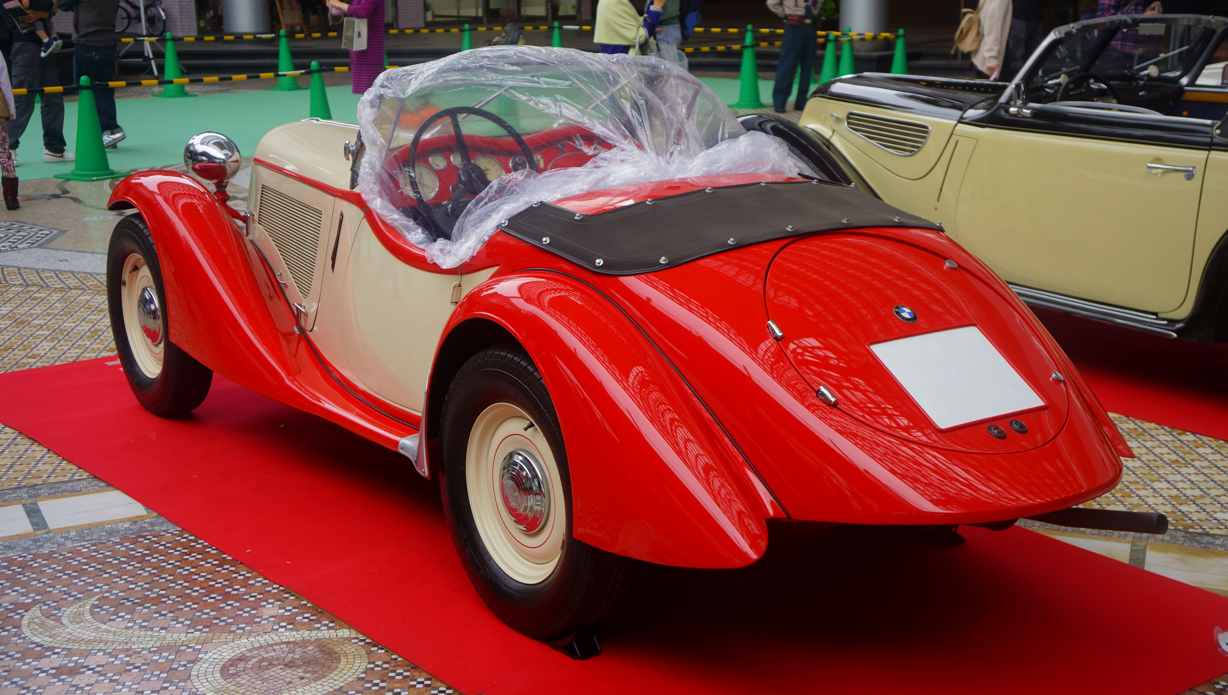 BMW 315/1ロードスター 後方。 13年10月20日 堺市ポルタスセンタービル内ポルタス広場にて。